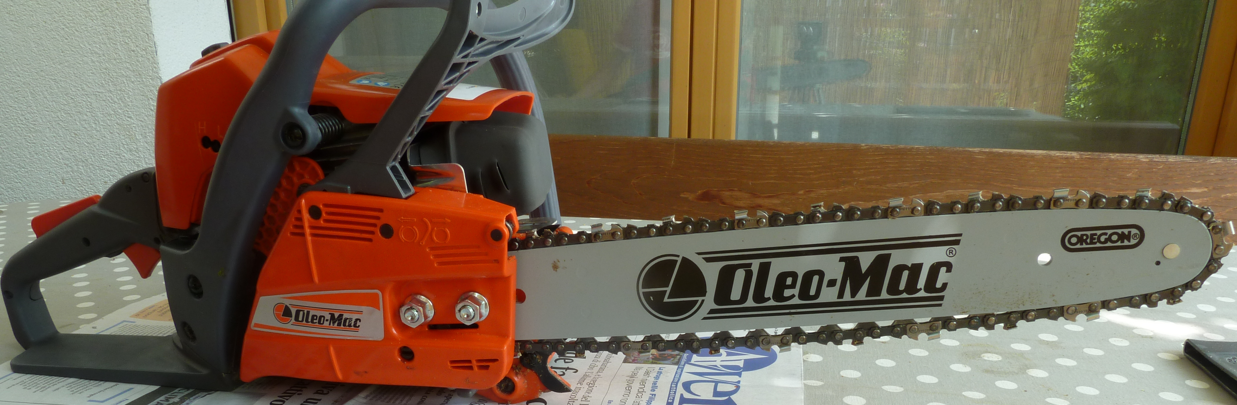 Kettensäge